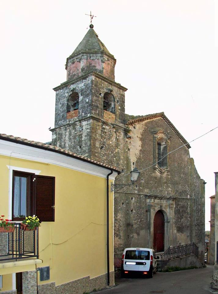 facciata